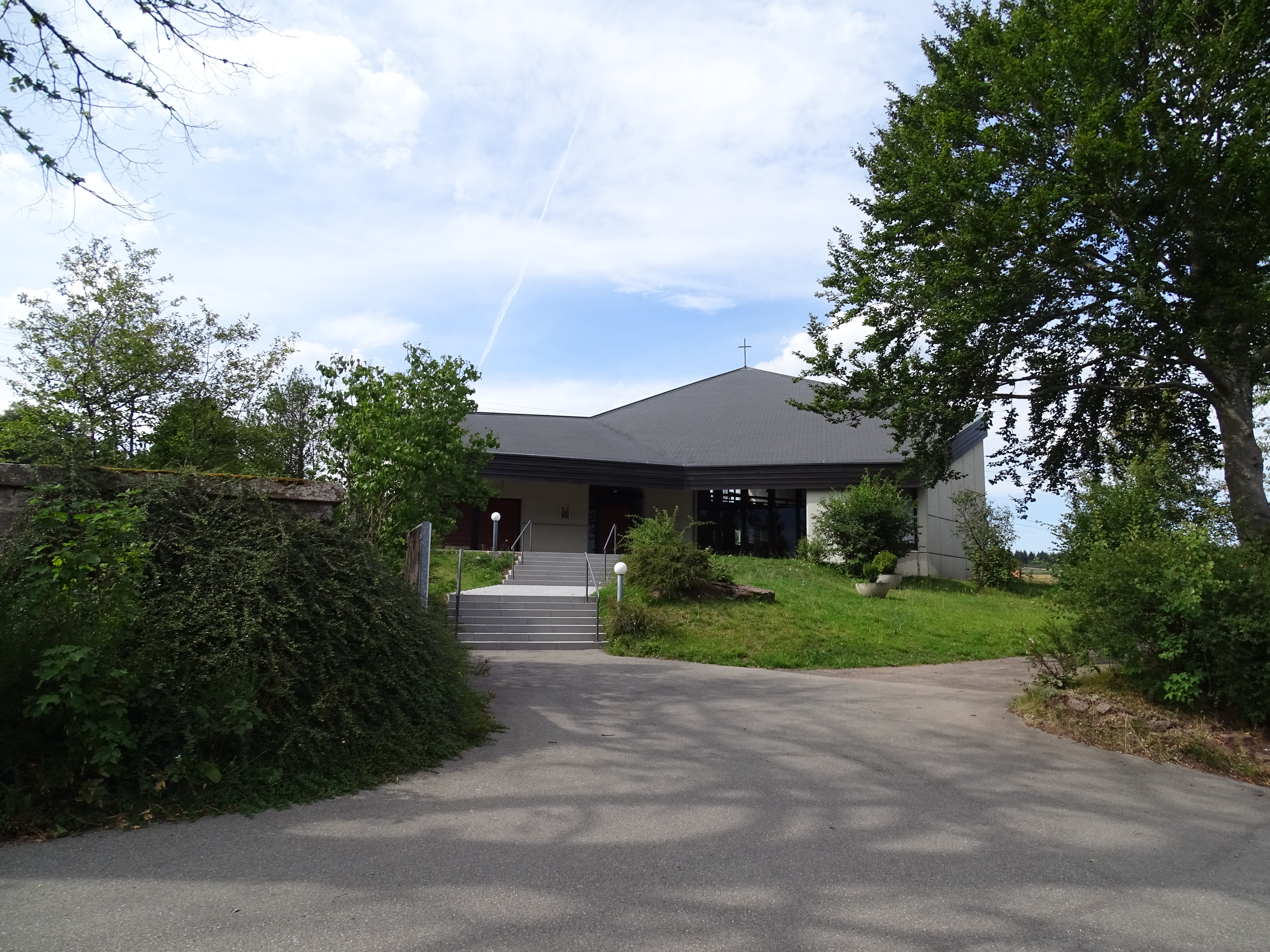 Auferstehungskirche Agenbach, zugleich Friedhofsgebäude